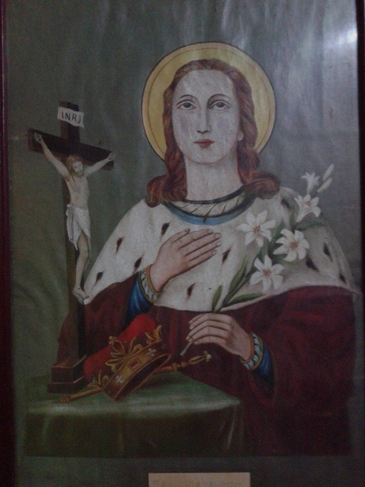 Imagen de San Casimiro. Cuadro ubicado en la casa parroquial.